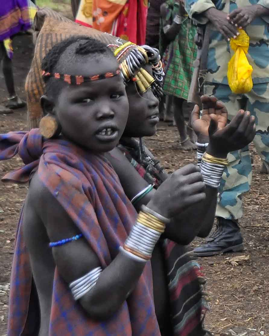 Little Mursi, Ethiopia